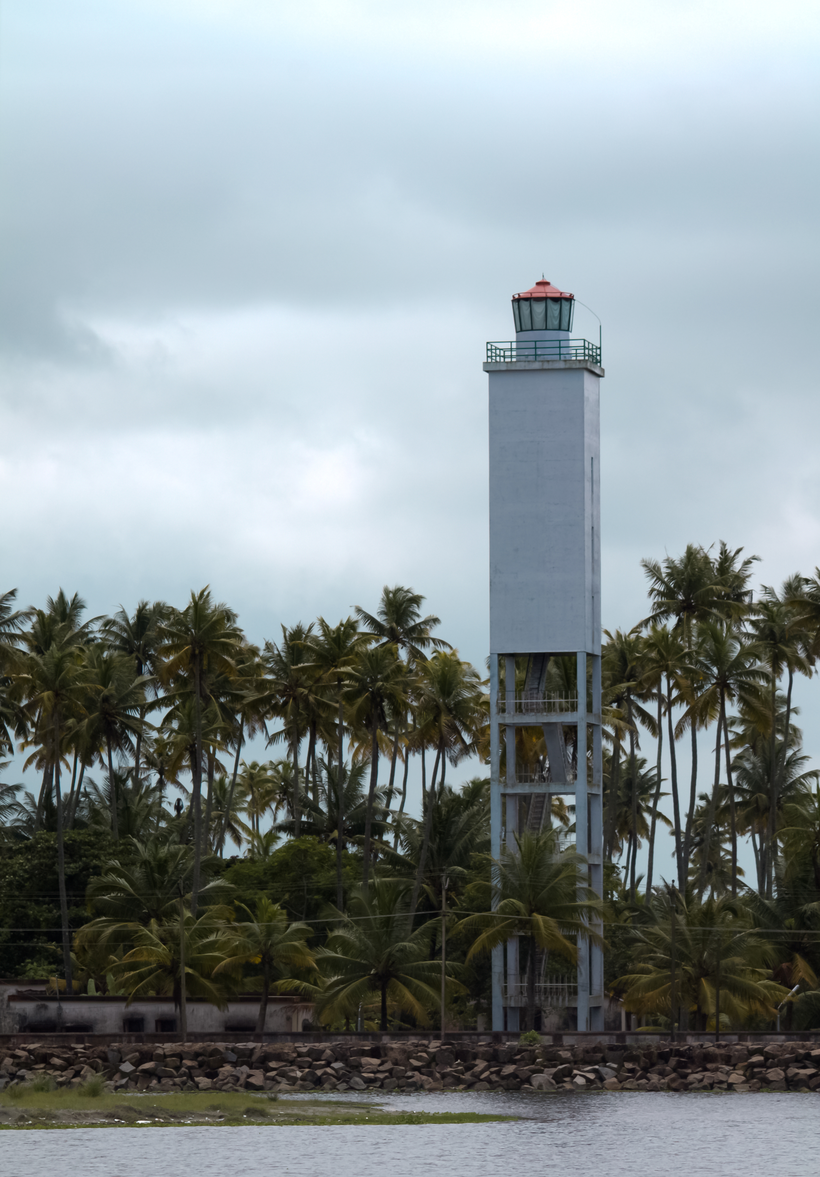 മനക്കോടം വിളക്കുമാടം